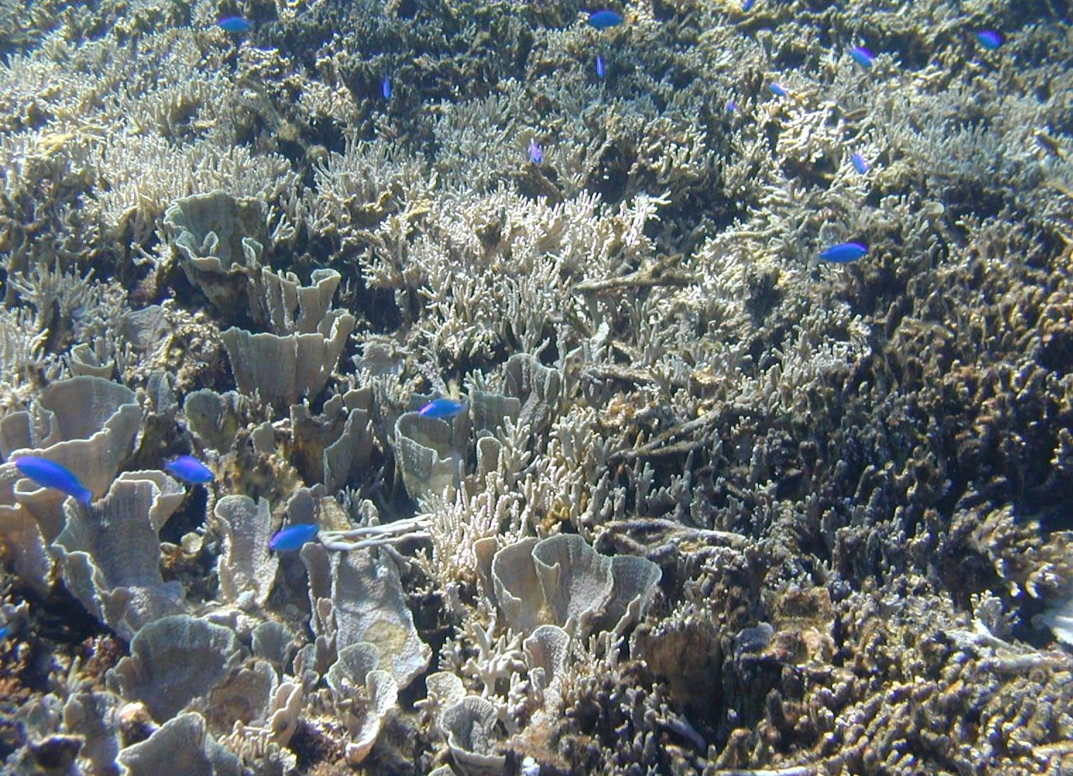 Shiraho Reef at Ishigakijima (石垣島の白保のサンゴ礁。投稿者撮影。)